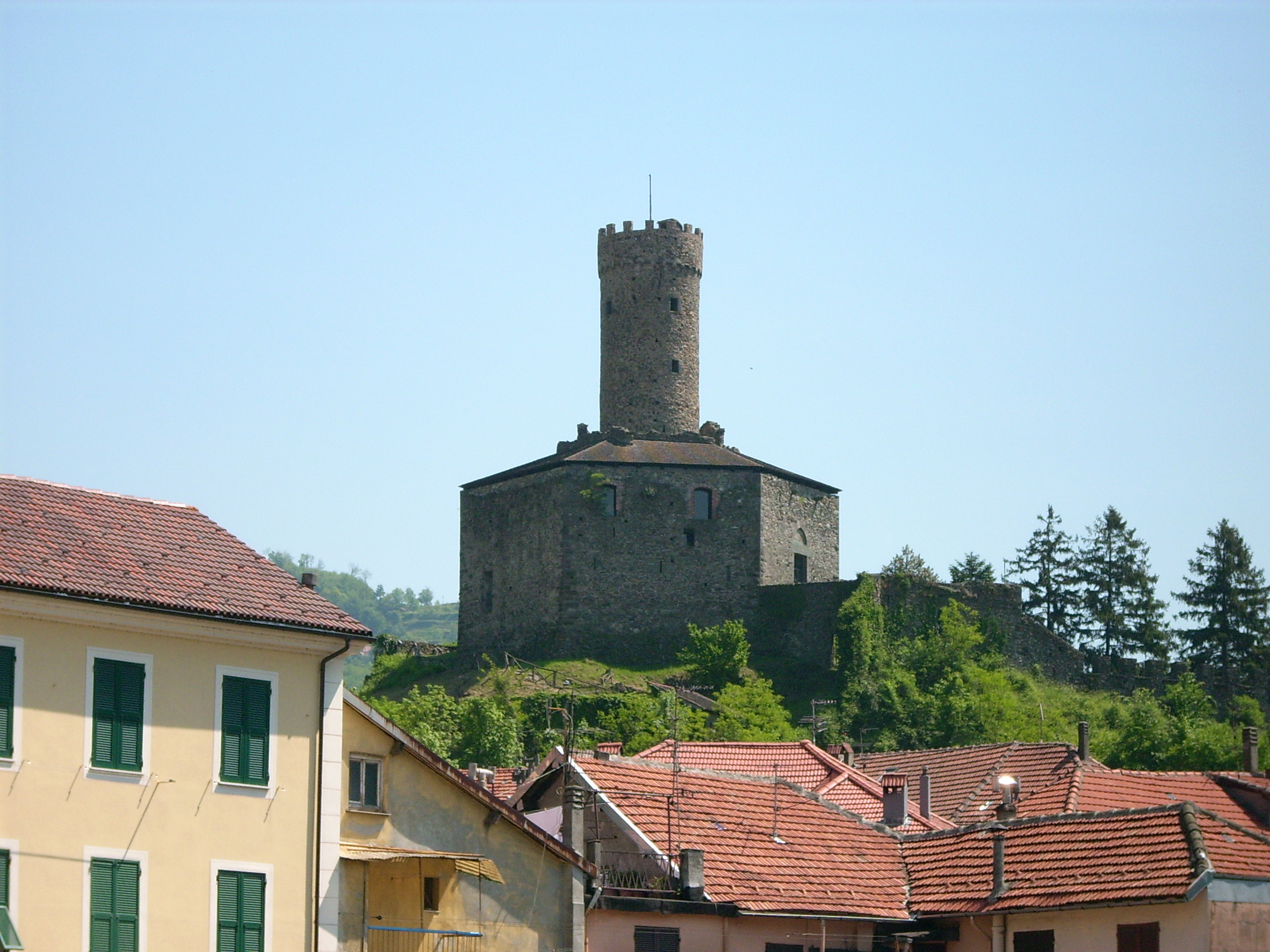 Castello Spinola di Campo Ligure, Liguria, Italia